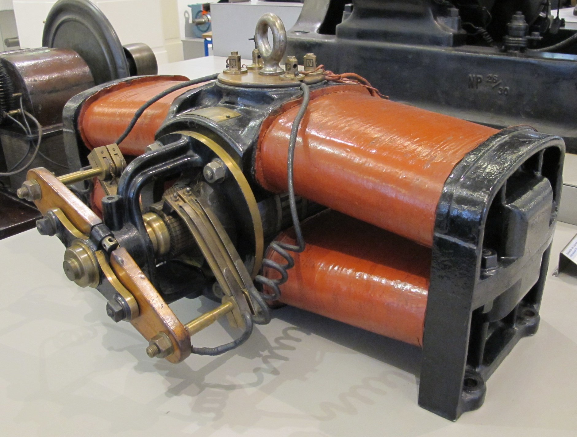 Gleichstromgenerator nach dem System von Bürgin der International Electric Company Ltd. Kennezichnend ist, dass mehrere Ringwicklungen zu einen Zylinder zusammengefasst sind. Hersteller: International Electric Company, Ltd. Baujahr: ca. 1880